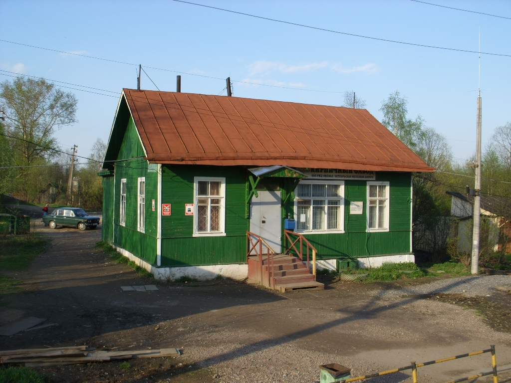 Станционное здание ст. Кирпичный Завод